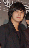 영화 비상